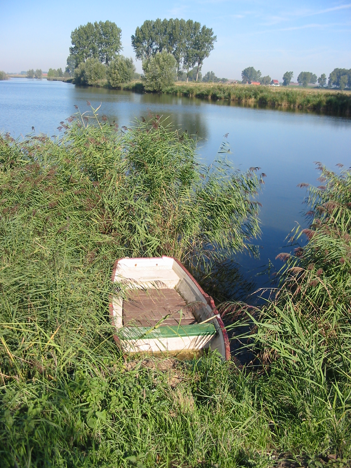 Belgium, Sint-Laureins, Boerekreek